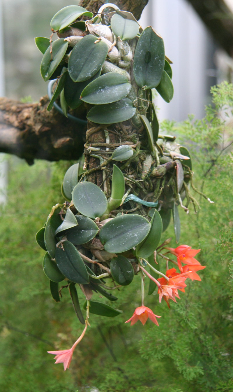 Sophronitis cernua im Botanischen Garten Dresden